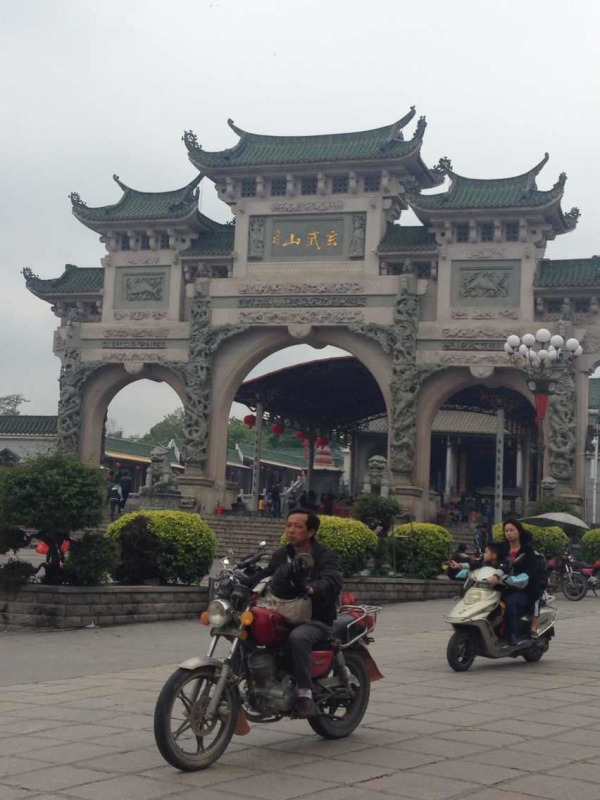 碣石镇玄武山南门前驶过的摩托车